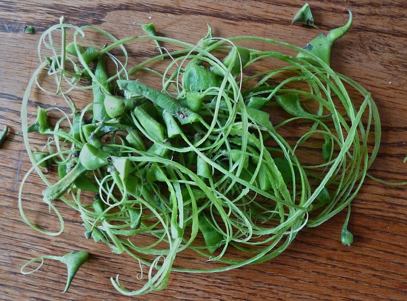 Fäden, wenn Stangenbohnen was älter sind.